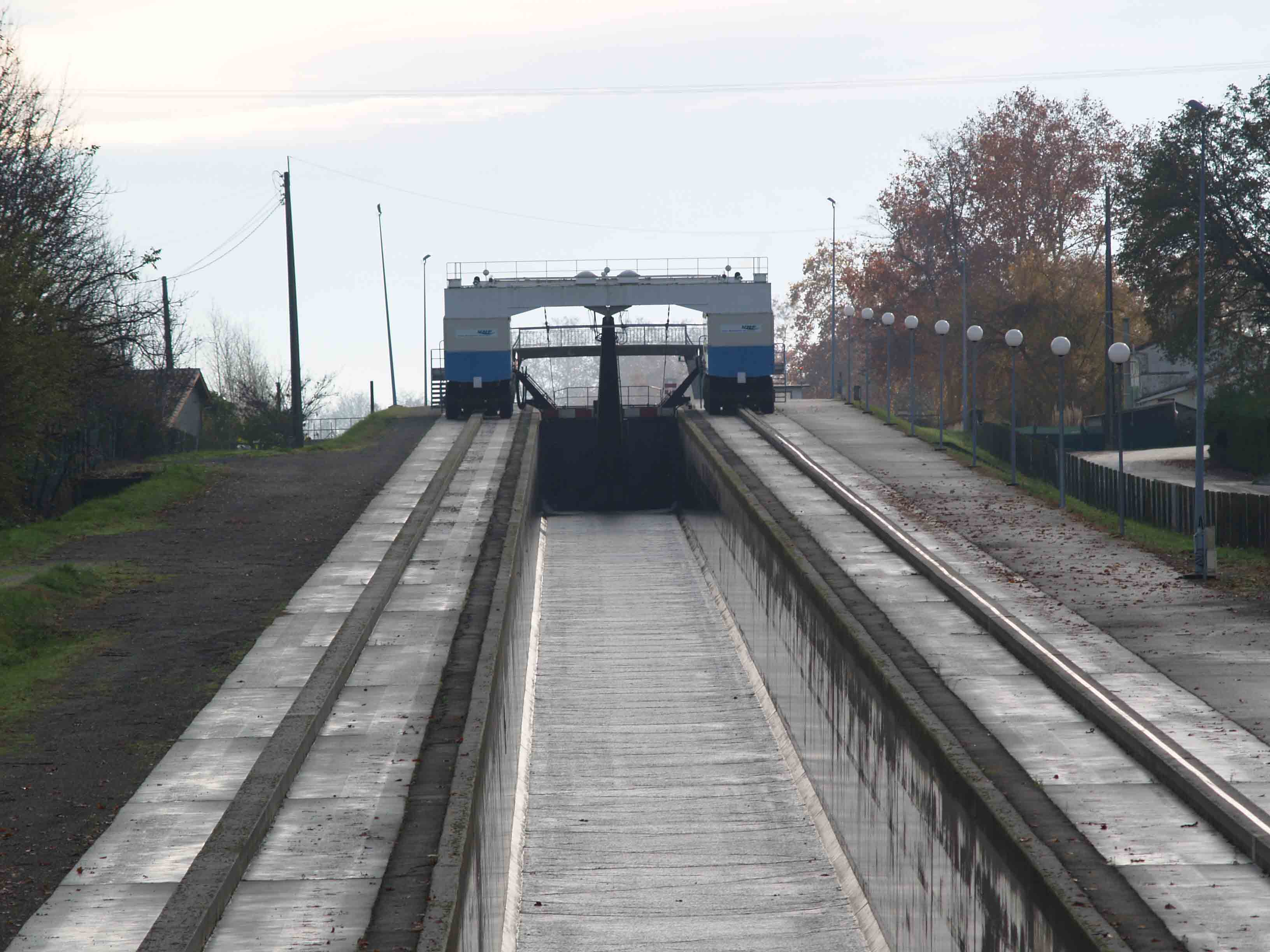 Pente d'eau de Montech Photo personnelle Bertrand Bouret